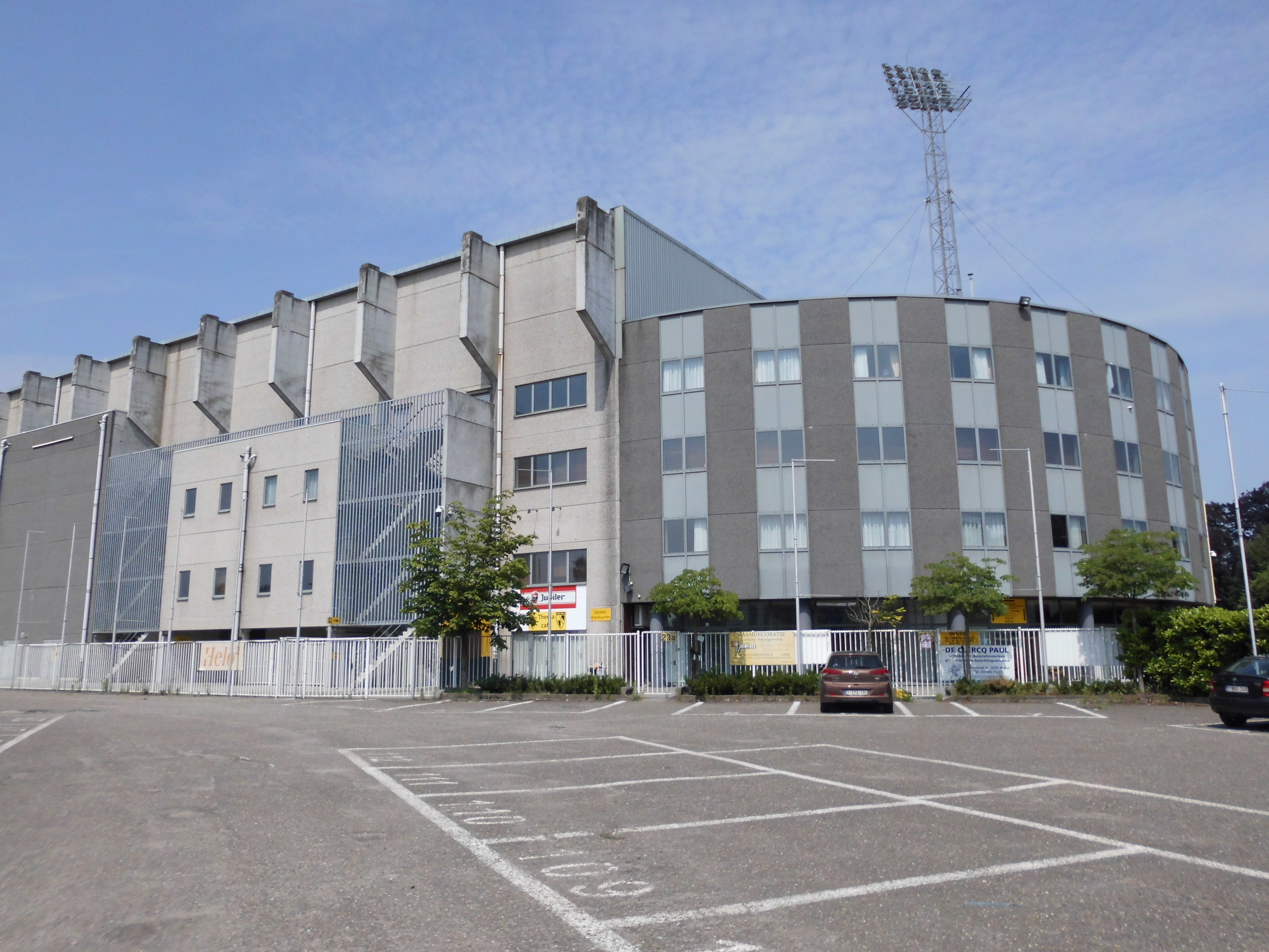 voetbalstadion Lierse anno 2018